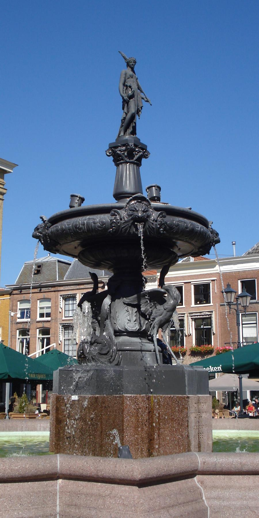 Gorinchem, Grote Markt. Kunstwerk "Wilhelminafontein". The Netherlands. The photographical reproduction of this work is covered under the article 18 of the Dutch copyright law, which states that “it is not an infringement of copyright to reproduce and publish pictures of a work, as meant in article 10, first paragraph, under 6°[1] or of an architectural work as meant in article 10, first paragraph, under 8°[2], which are made to be permanently located in a public place, as long as the work is depicted as it is located in the public space. Where incorporation of a work in a compilation is concerned, not more than a few of the works of the same author may be included”. [1] drawings, paintings, works of architecture and sculpture, lithographs, engravings and the likes [2] drafts, sketches and three-dimensional works relating to architecture, geography, topography or other sciences Note that photographs are not included in Item 6. They are separately listed at Item 9 and are therefore not covered by FOP. See COM:CRT/Netherlands#Freedom of panorama for more information. .